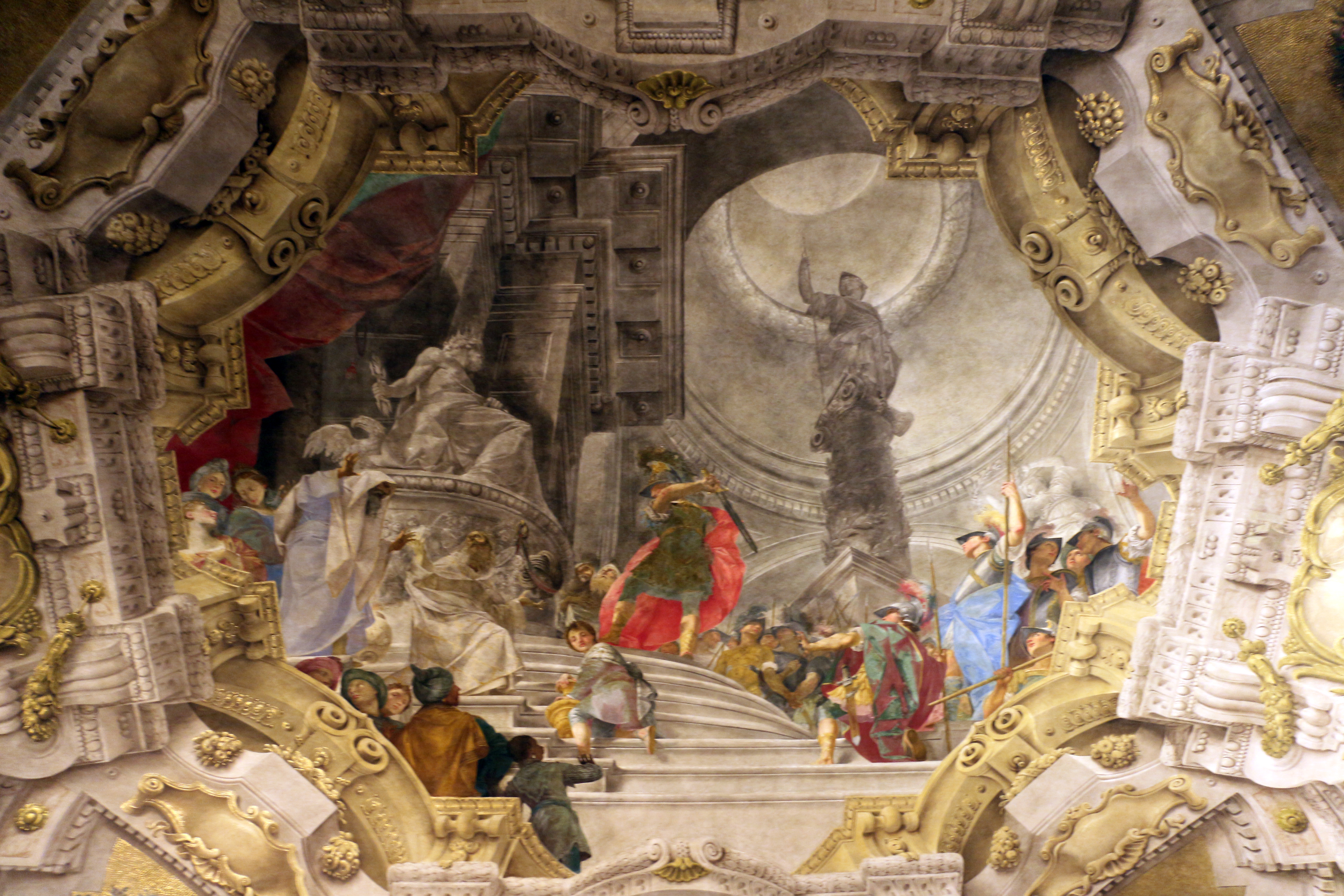 Pinacoteca Nazionale di Bologna in Palazzo Pepoli Campogrande This is a photo of a monument which is part of cultural heritage of Italy.